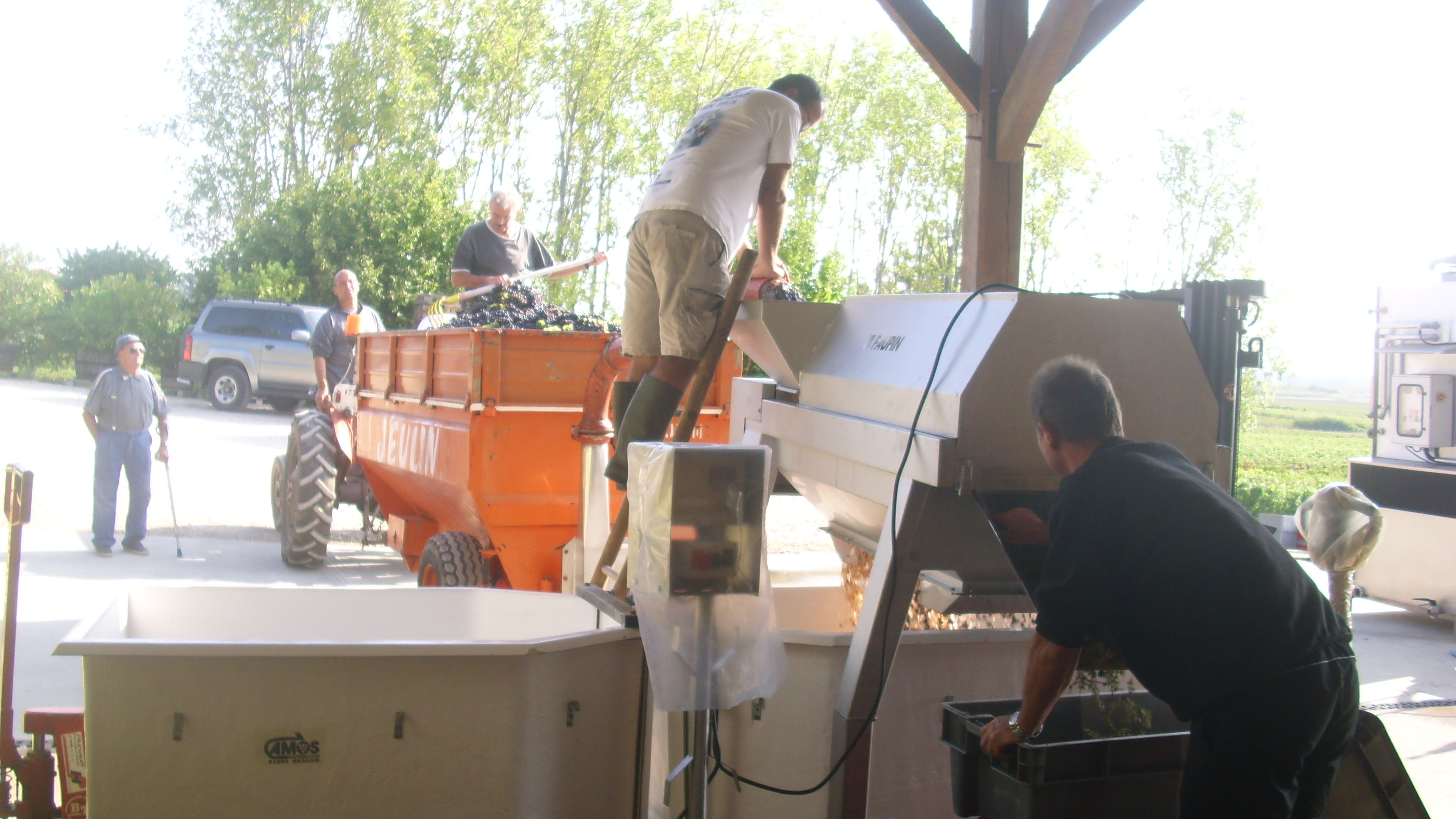 Entrappen von roten Trauben. Mit einer Stachelwalze werden die Trauben durch eine Loch- oder Gittertrommel gefördert. Die Beeren fallen durch und die Kämme (Rappen) werden am Trommelende ausgeworfen.